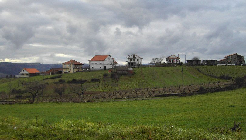 Vista panorâmica de Vilar de Lomba